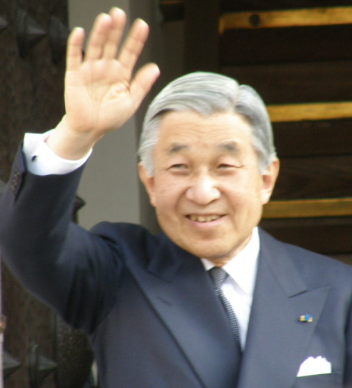 Akihito Tallinnas.